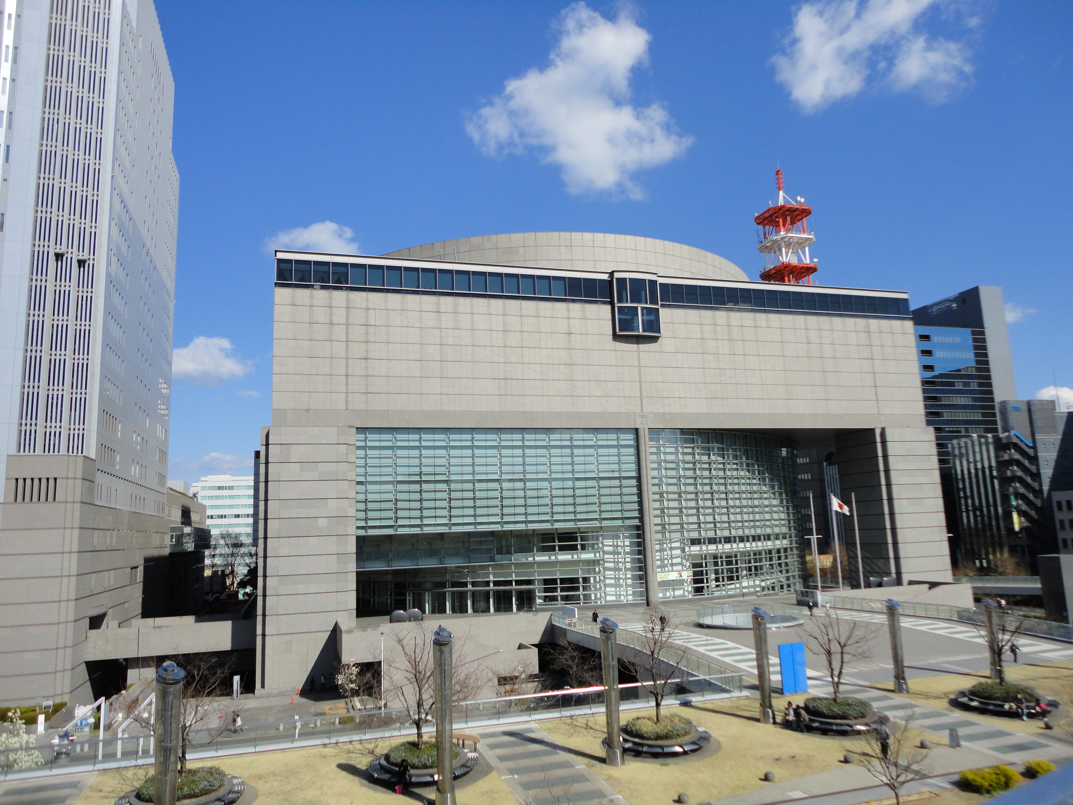 オアシス２１